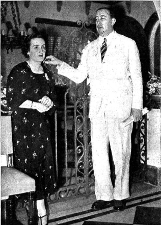 El Gobernador de Buenos Aires, Manuel Fresco, junto a su esposa Raquel de Monasterio.